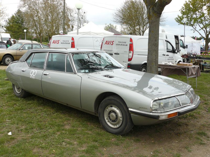 Mantes la Jolie 2012